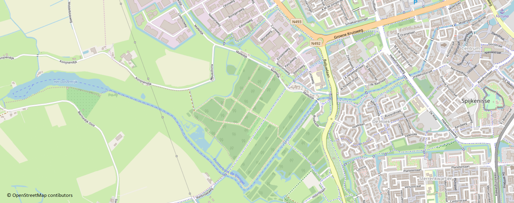 Plattegrond Het Oostenrijk en Vierambachtenboezem, Nissewaard This map may be incomplete, and may contain errors. Don't rely solely on it for navigation.